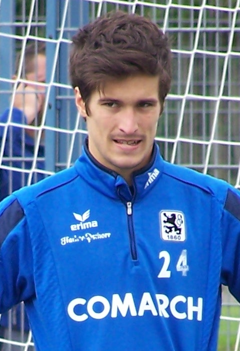 Jonatan Kotzke, 1860 München, Training Grünwalder Straße